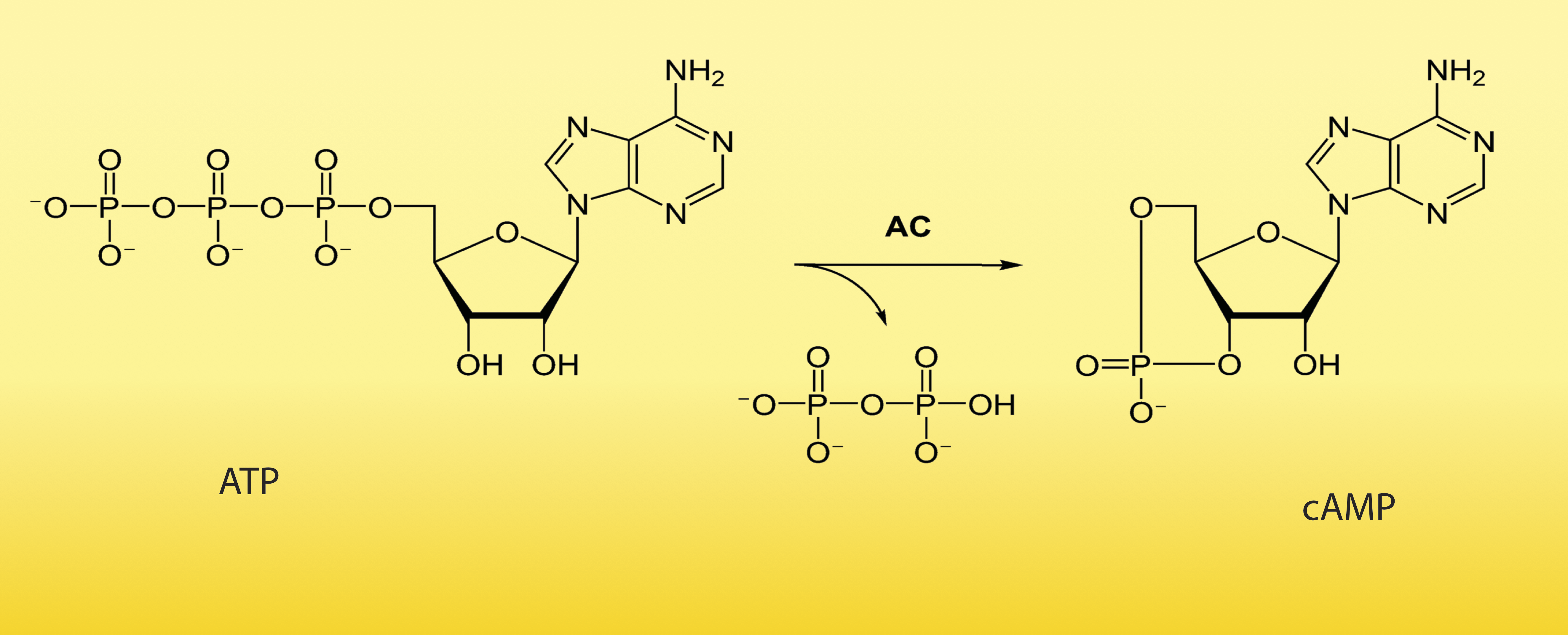 Reaction of adenylate kinase